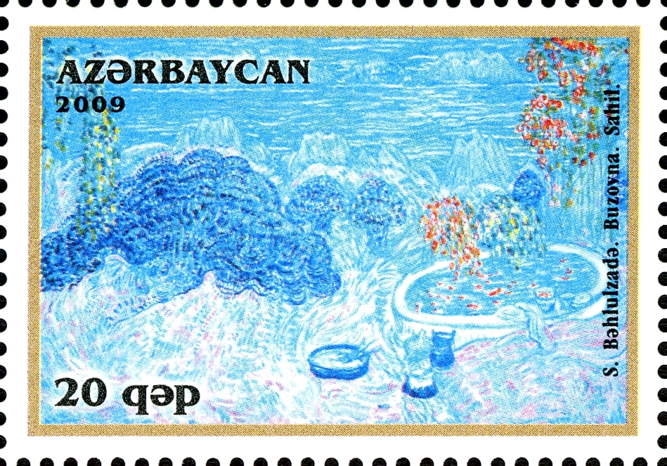 Azerbaijan Art School - Sattar Bakhlulzadeh - Buzovna Shore